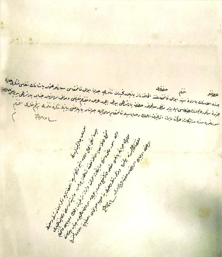 Yunda Adası (Alibey)'nın Ayvalık kaymakamlığına bağlanmasına dair irade.